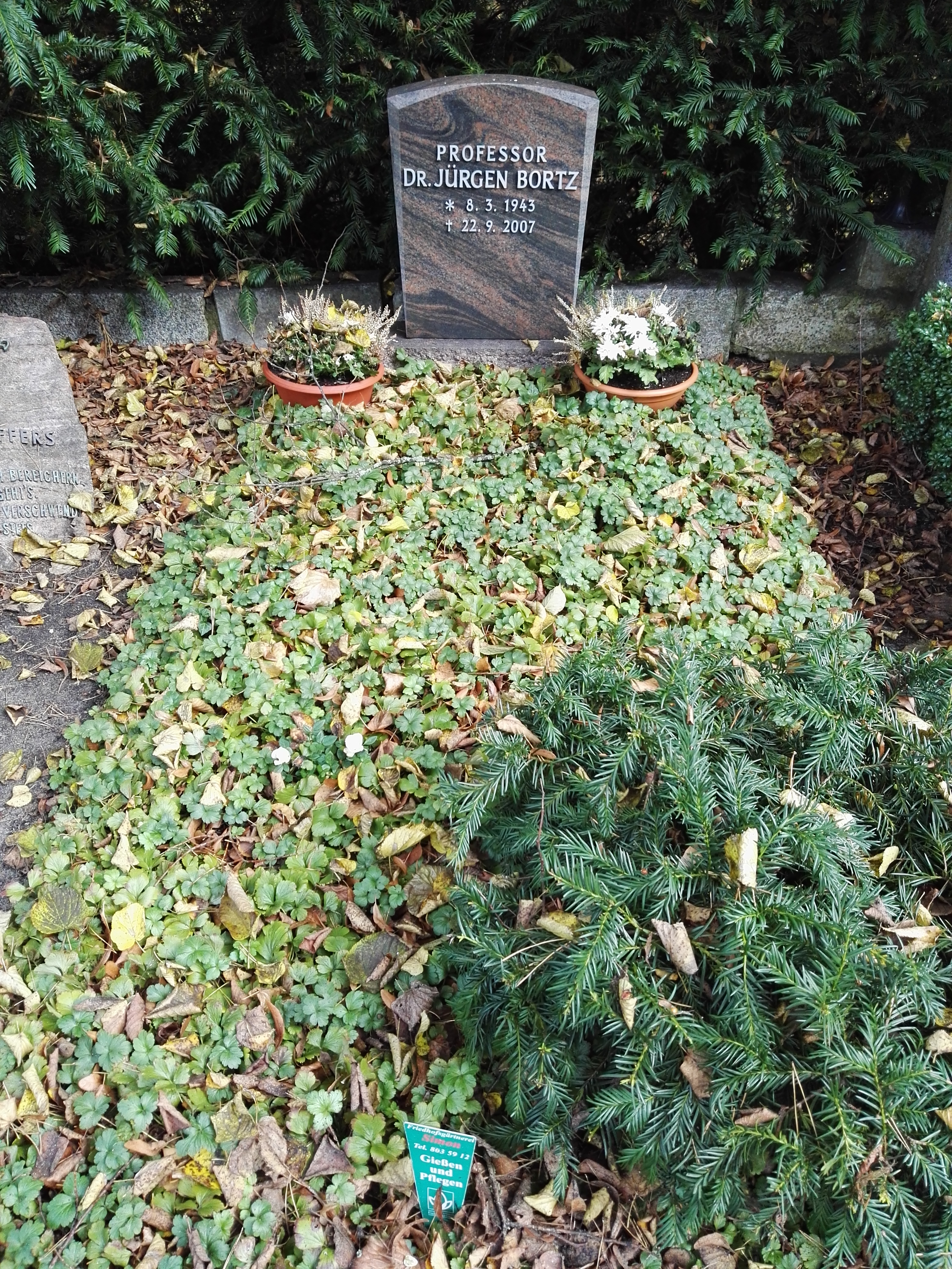 Grab von Prof. Jürgen Bortz (1943-2007) auf dem Friedhof Heerstraße in Berlin